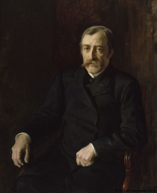 Carl Gustaf Estlander. Porträtt av Albert Edelfelt 1896.